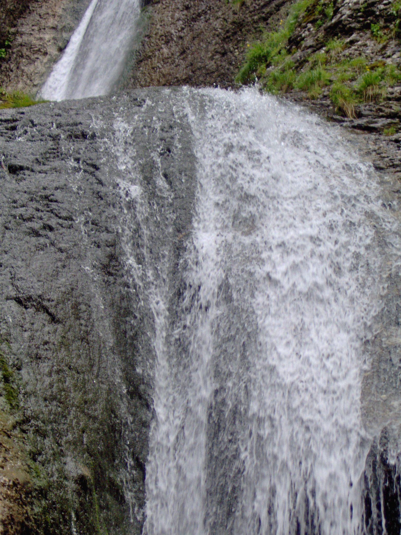 Cascada Duruitoarea, Ceahlău, 2006